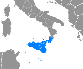 Idioma siciliano